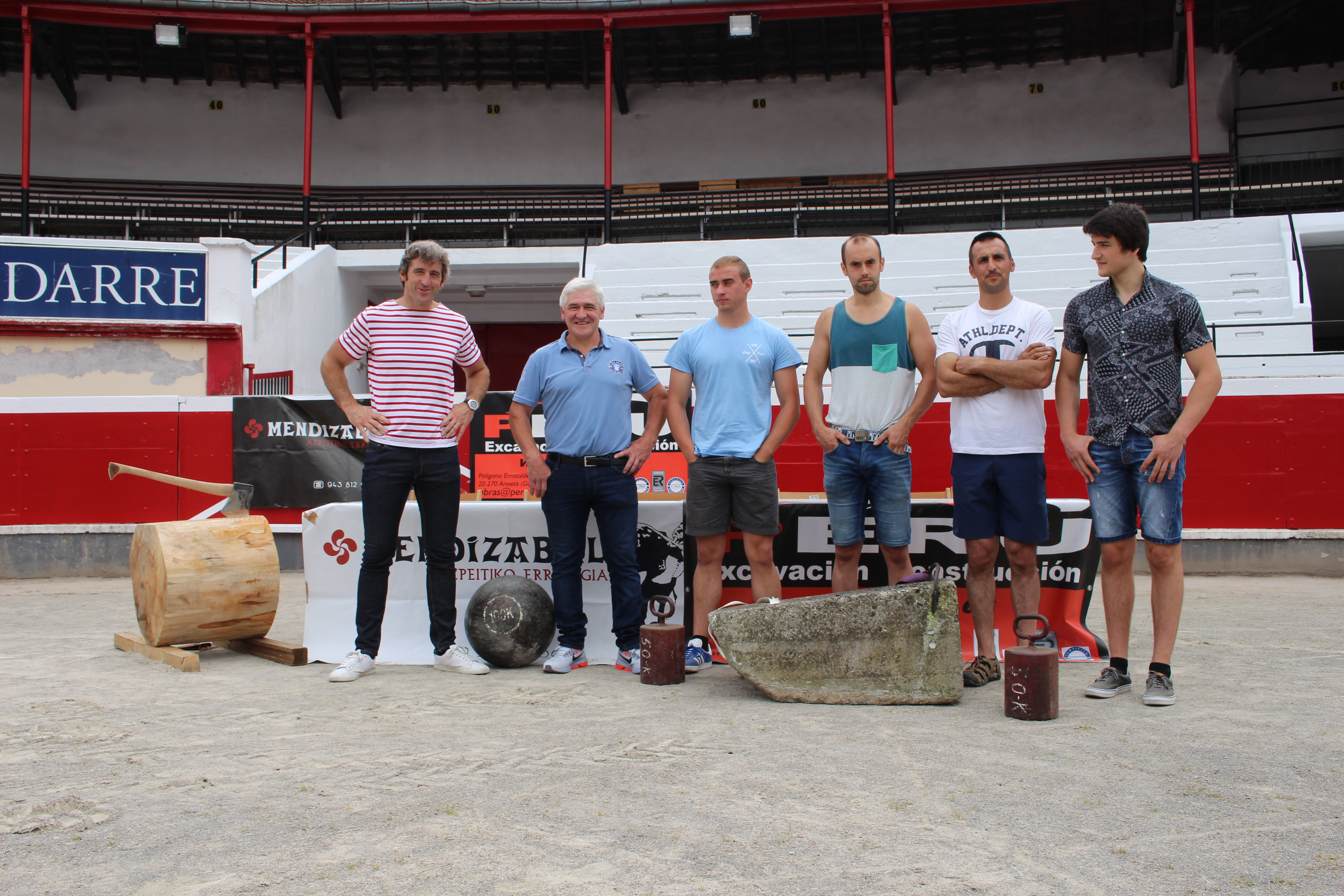 2018ko Euskal Pentatloi Txapelketaren aurkezpena Azpeitiko zezen-plazan. Argazkian, ezkerretik eskuinera, Arria V.a, Txapartegi, Zelai, Maiza, Zaldua eta Arria VI.a. ageri dira.